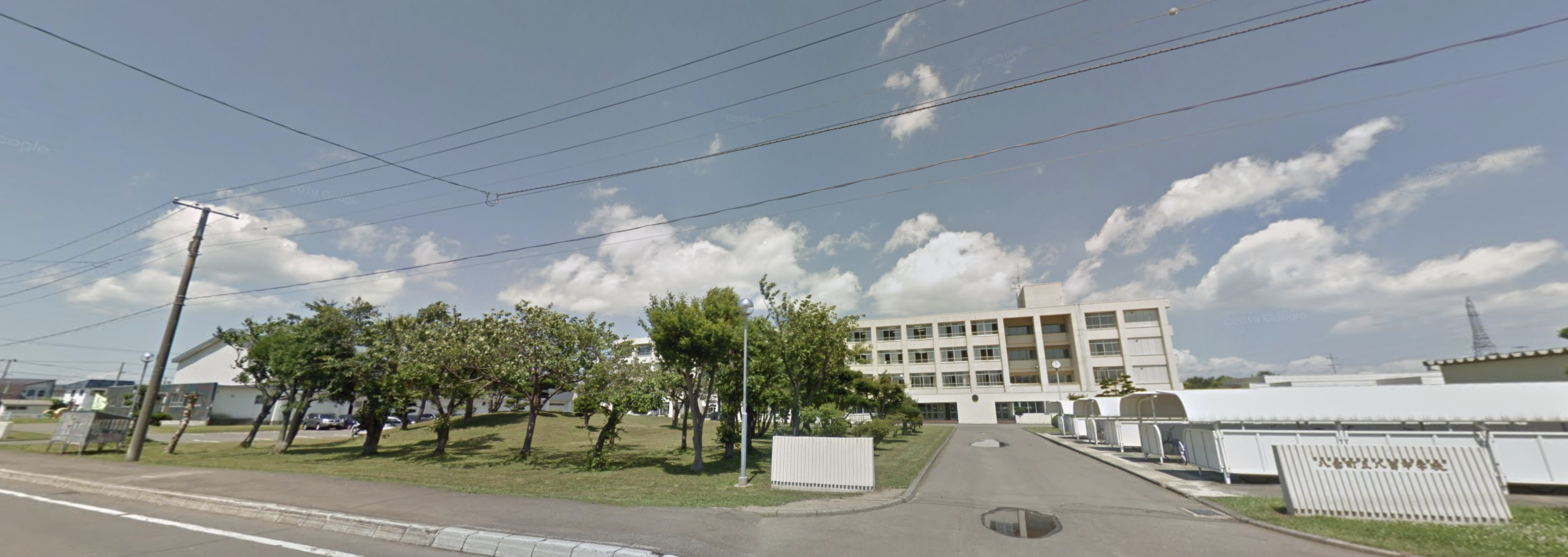 八雲中学校の校舎